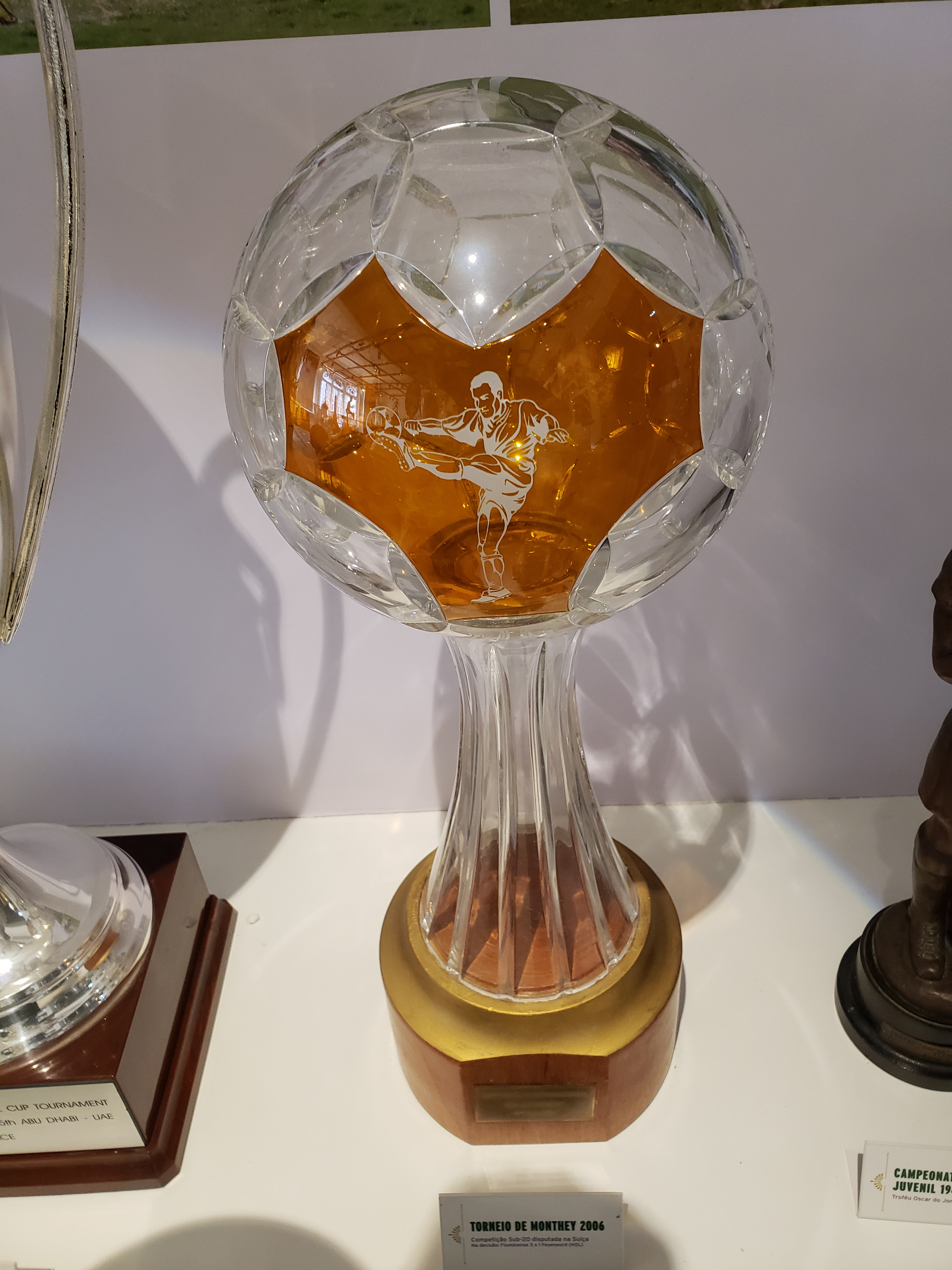 Torneio de Monthey Sub 20 2006 conquistado pelo Fluminense Football Club.